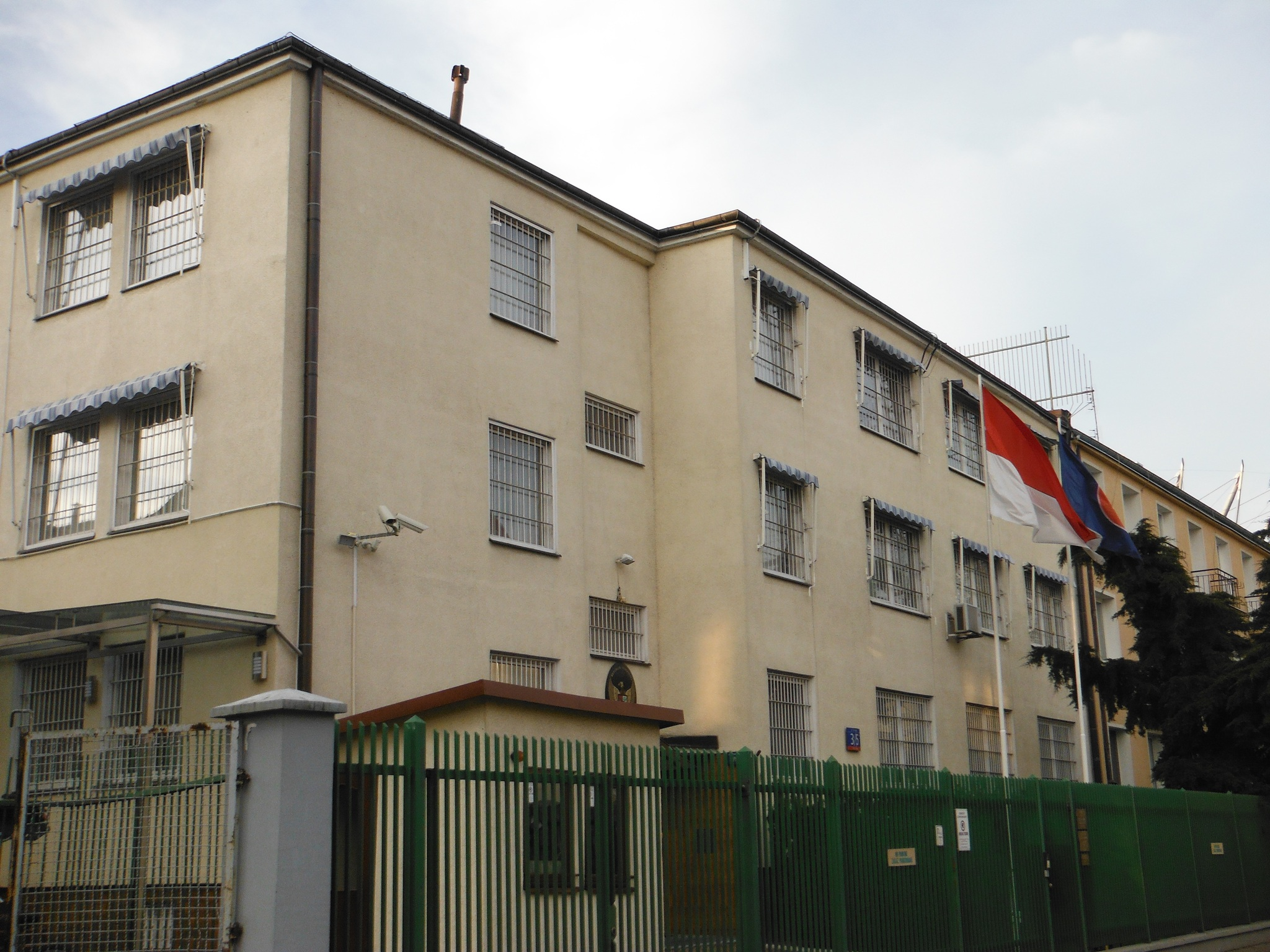 Gmach Ambasady Indonezji przy ul. Estońskiej 3/5 w Warszawie.